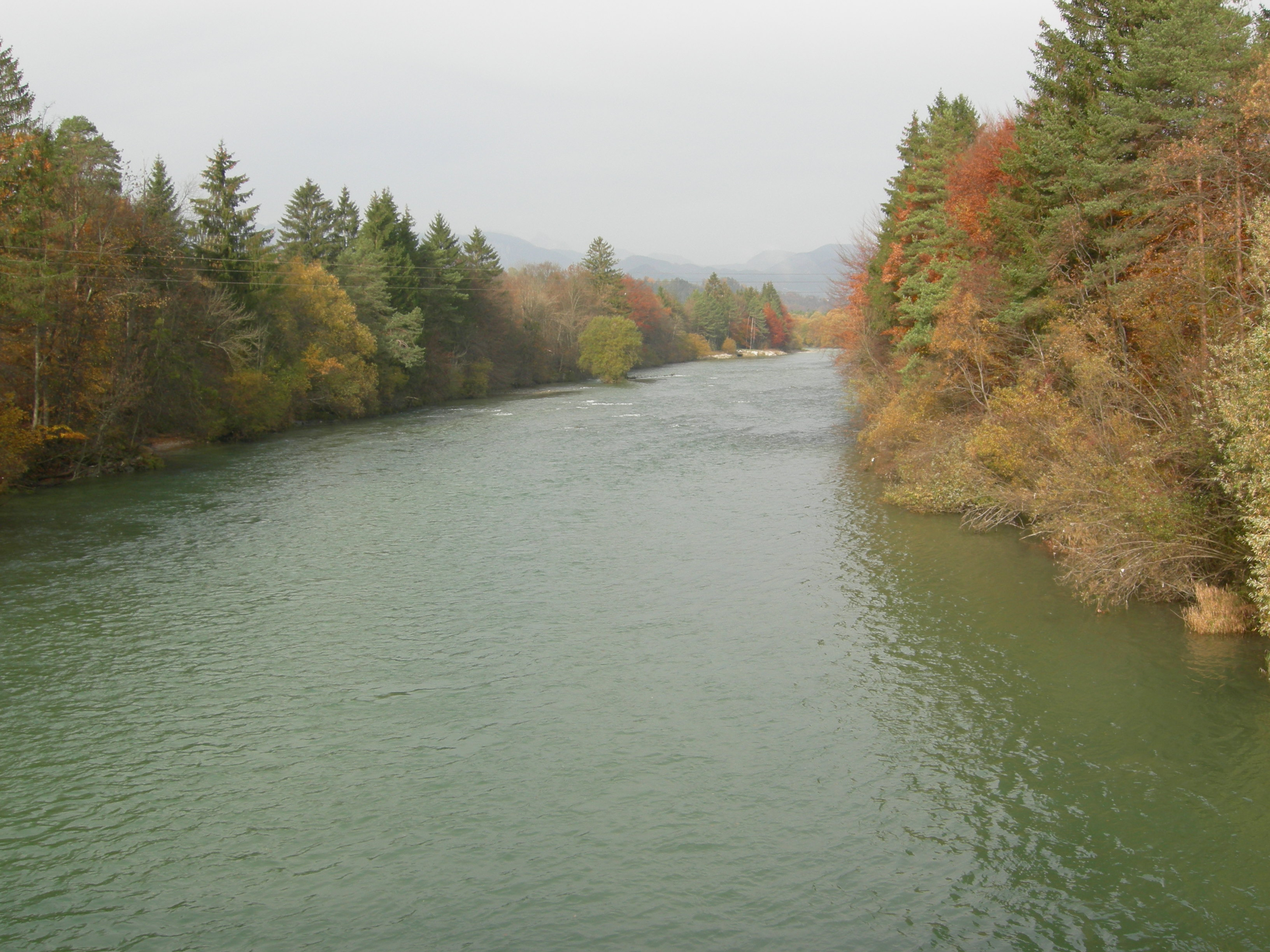 River Sava near Radovljica (Lancovo), Slovenia